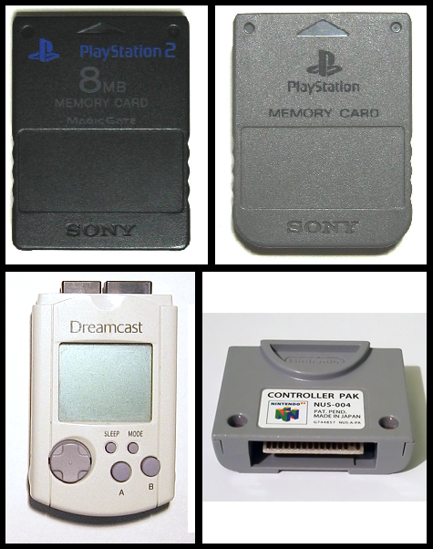 Montagem de fotos de memory cards de consoles de videogames.